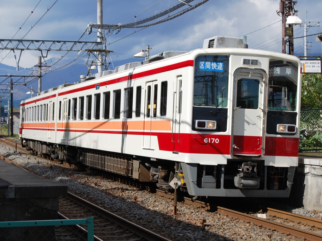 東武6050系電車6170編成・日光線「区間快速浅草ゆき」2両（2008/10/28・上今市にて撮影）